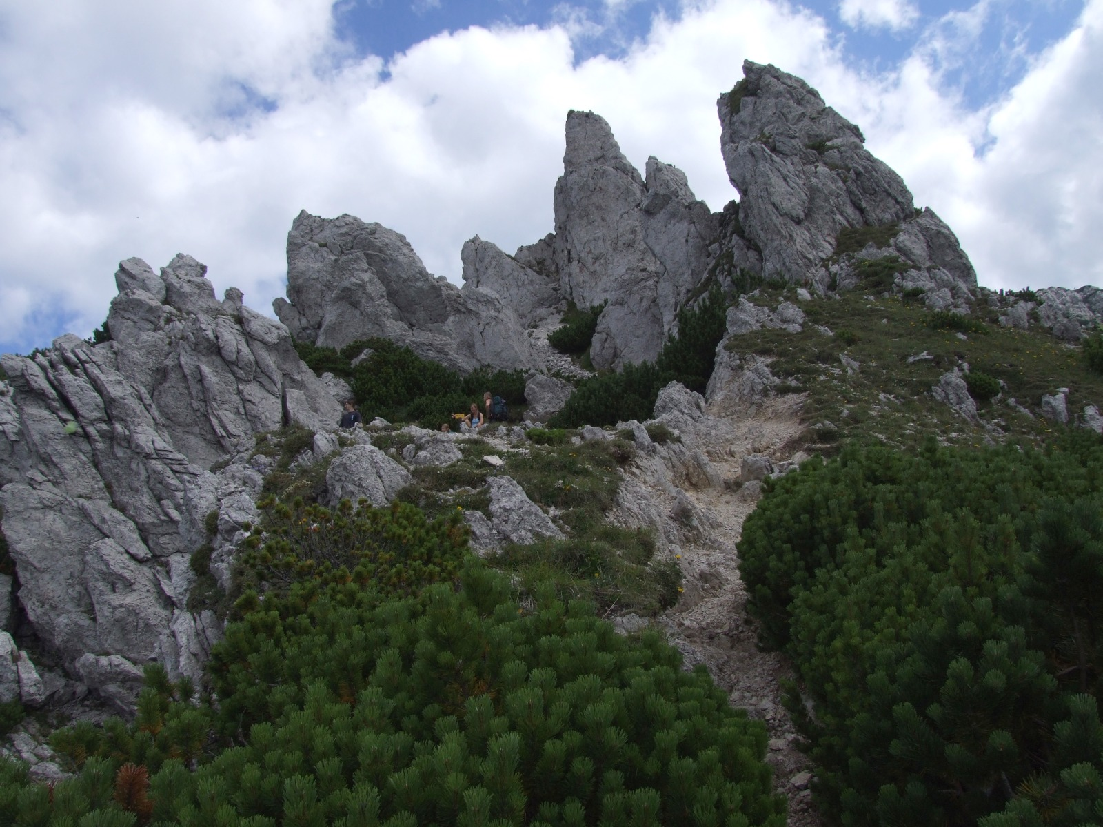 Grań Siwego Wierchu (Tatry)